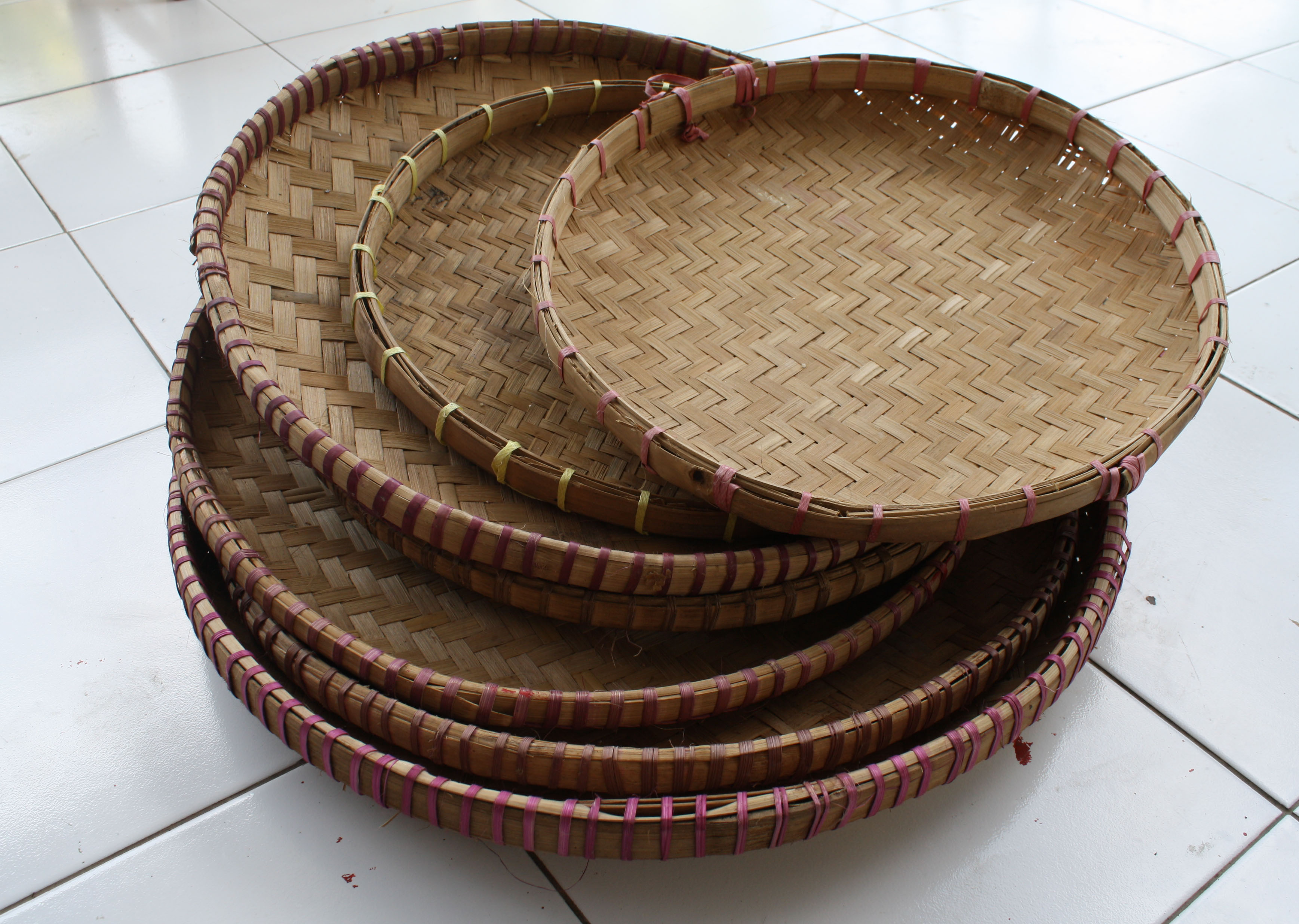 Na Vosa Vakaviti: Nampah adalah salah satu alat yang dipakai untuk merampi bers